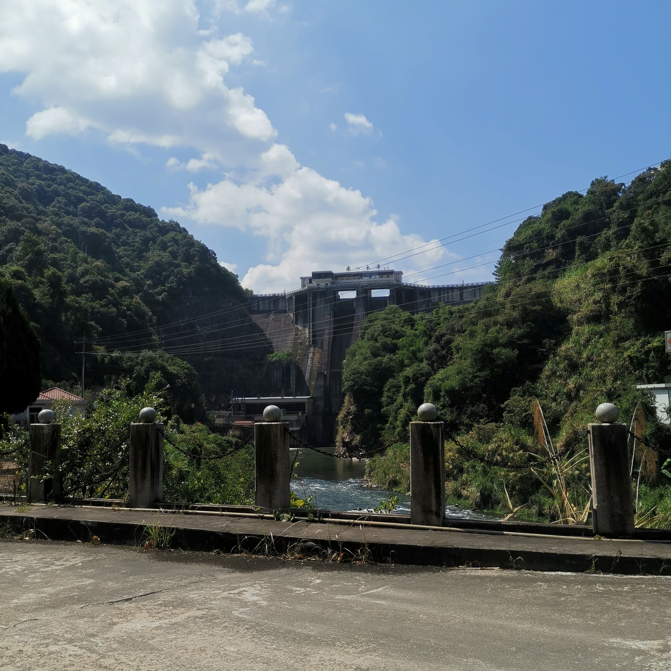 中文（中国大陆）: 南一水库大坝